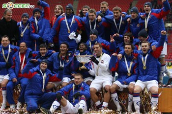 ЦСКА после победы над Рубином в Суперкубке России 2009